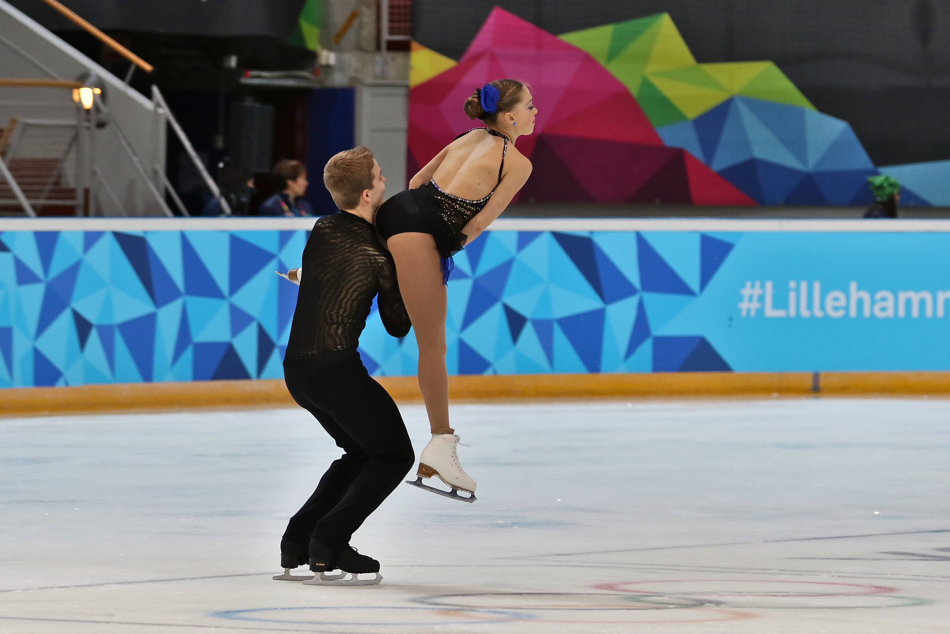 Lillehammer 2016 - Figure Skating Pairs Short Program - Justine Brasseur and Mathieu Ostiguy